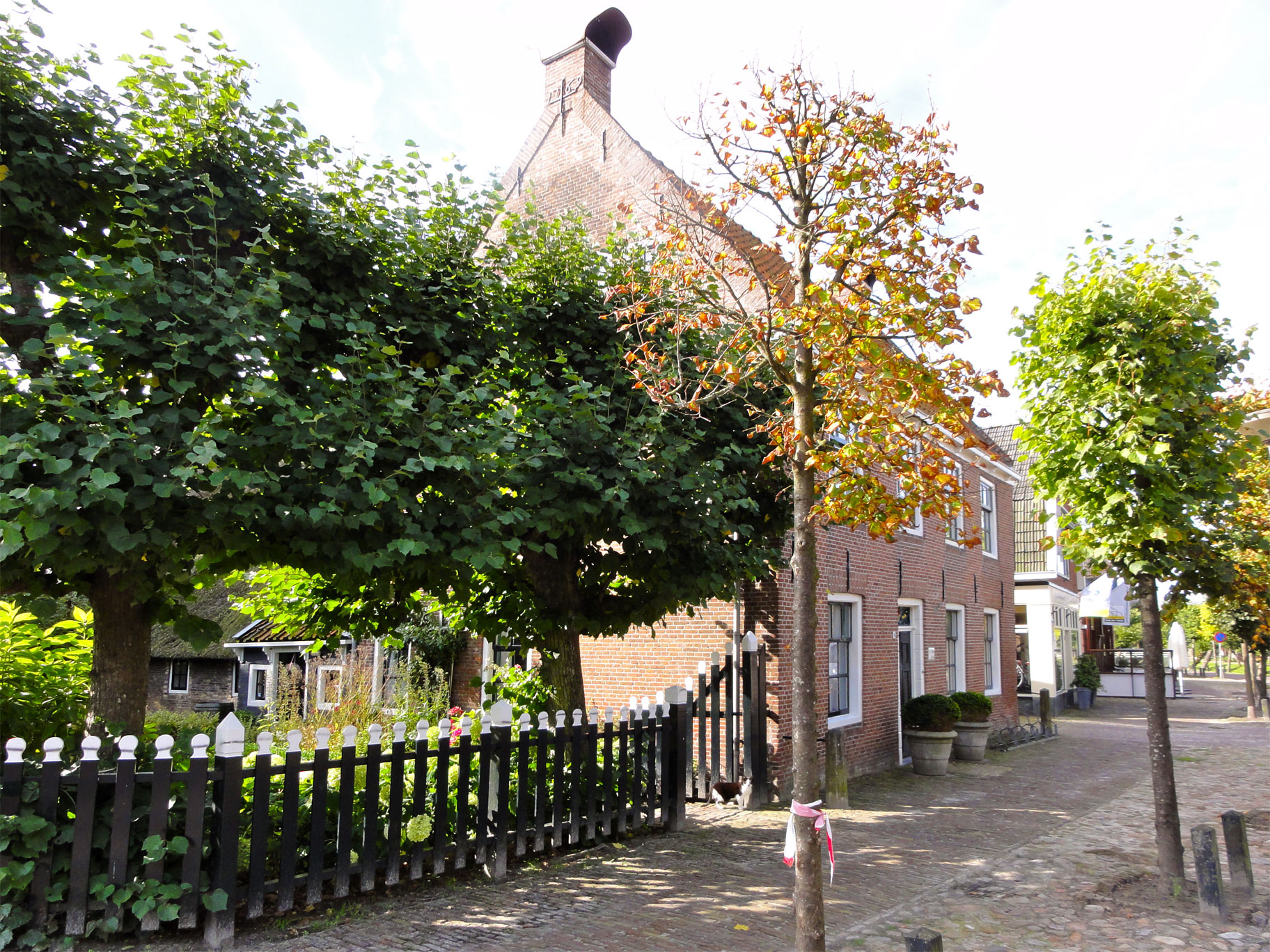 Elte Martens Beimastrjitte 46 Eastermar